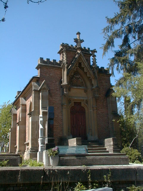 Cimitirul Hajongard Cluj-Napoca